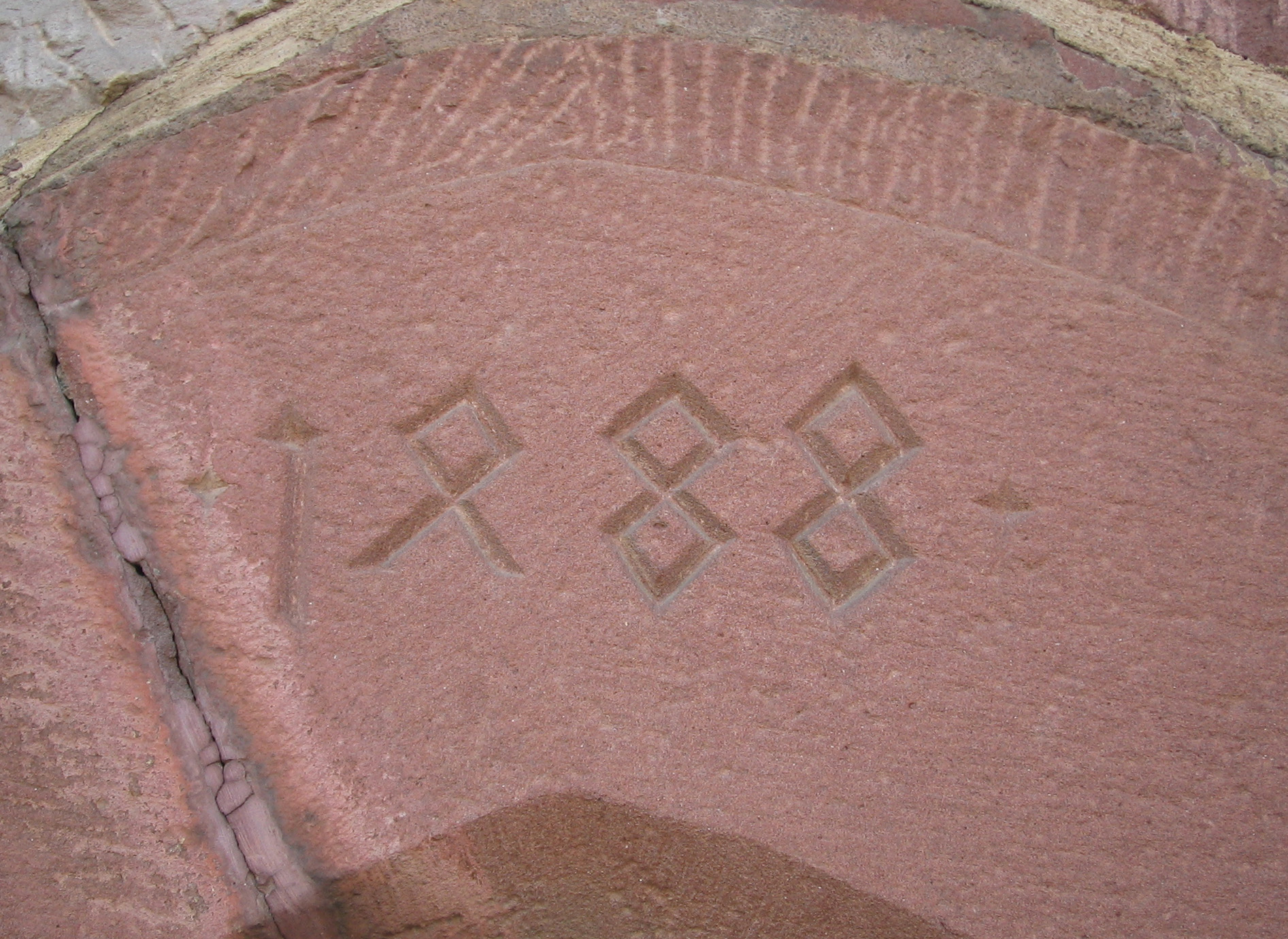 Darstellung der Ziffer 4 als halbe Acht in eckiger Schreibweise